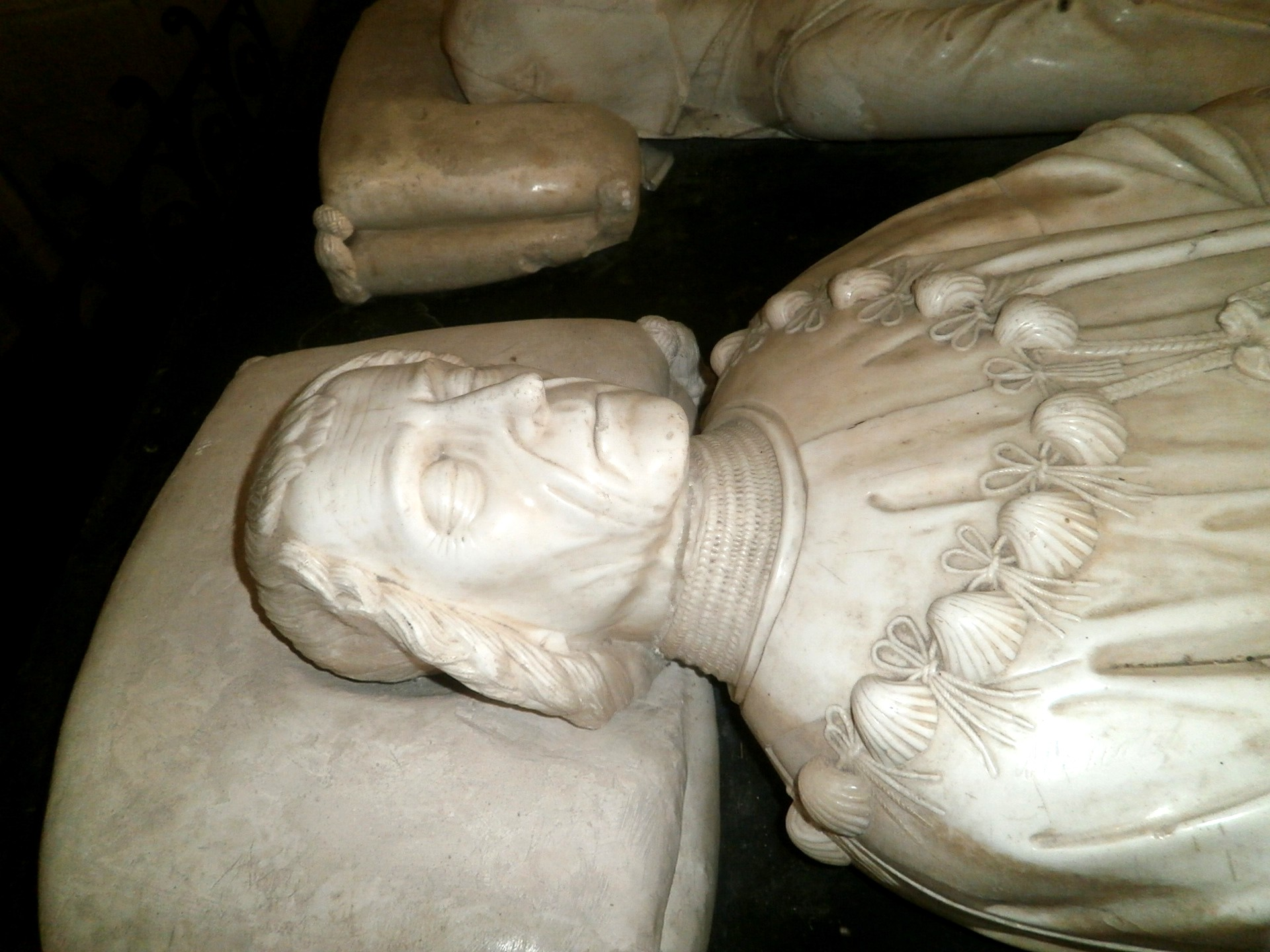 Imbert de Batarnay (gisant dans la collégiale Saint-Jean-Baptiste)